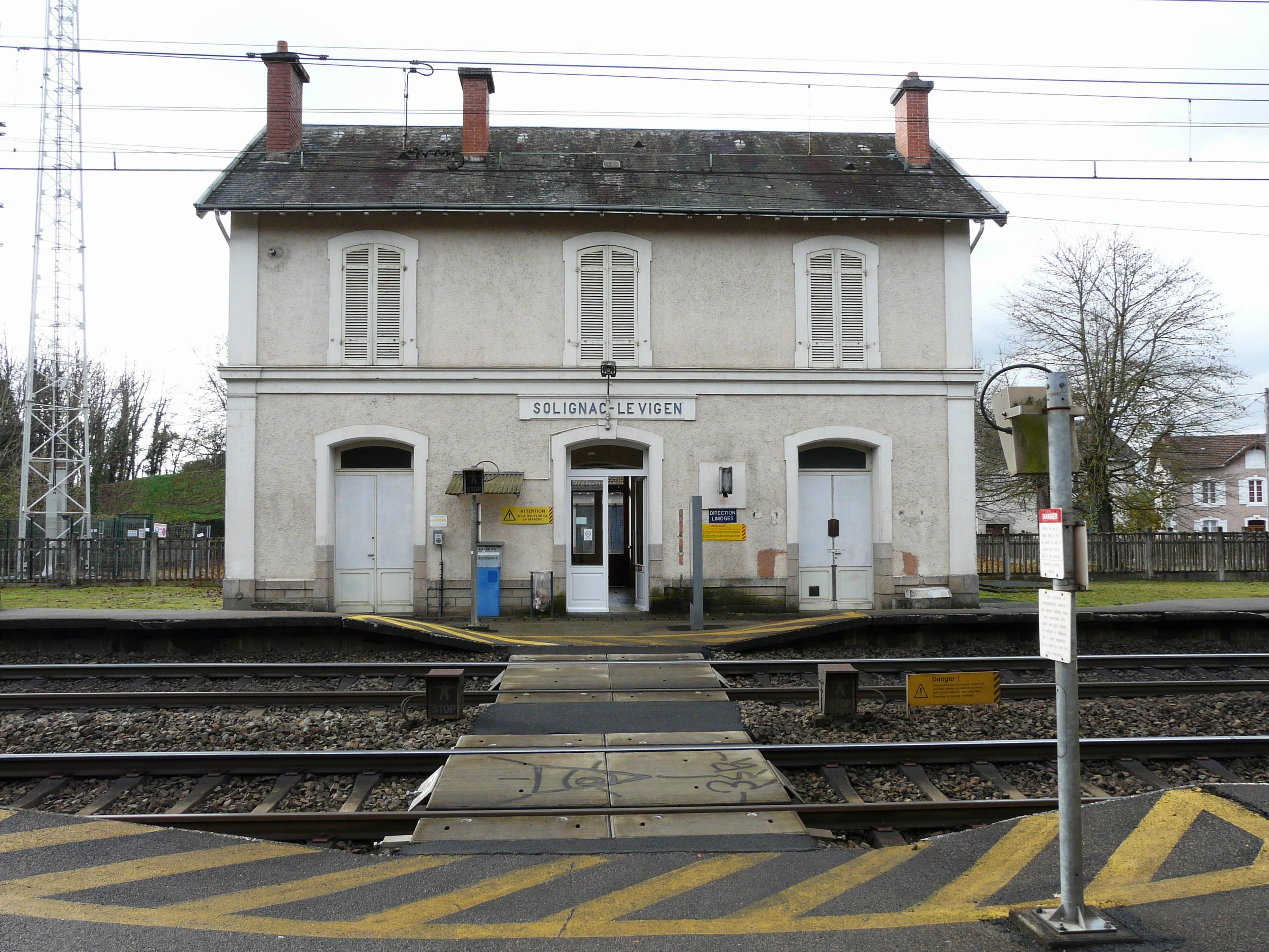 Ancien bâtiment voyageurs de la gare de Solignac - Le Vigen, Le Vigen, Haute-Vienne, France.